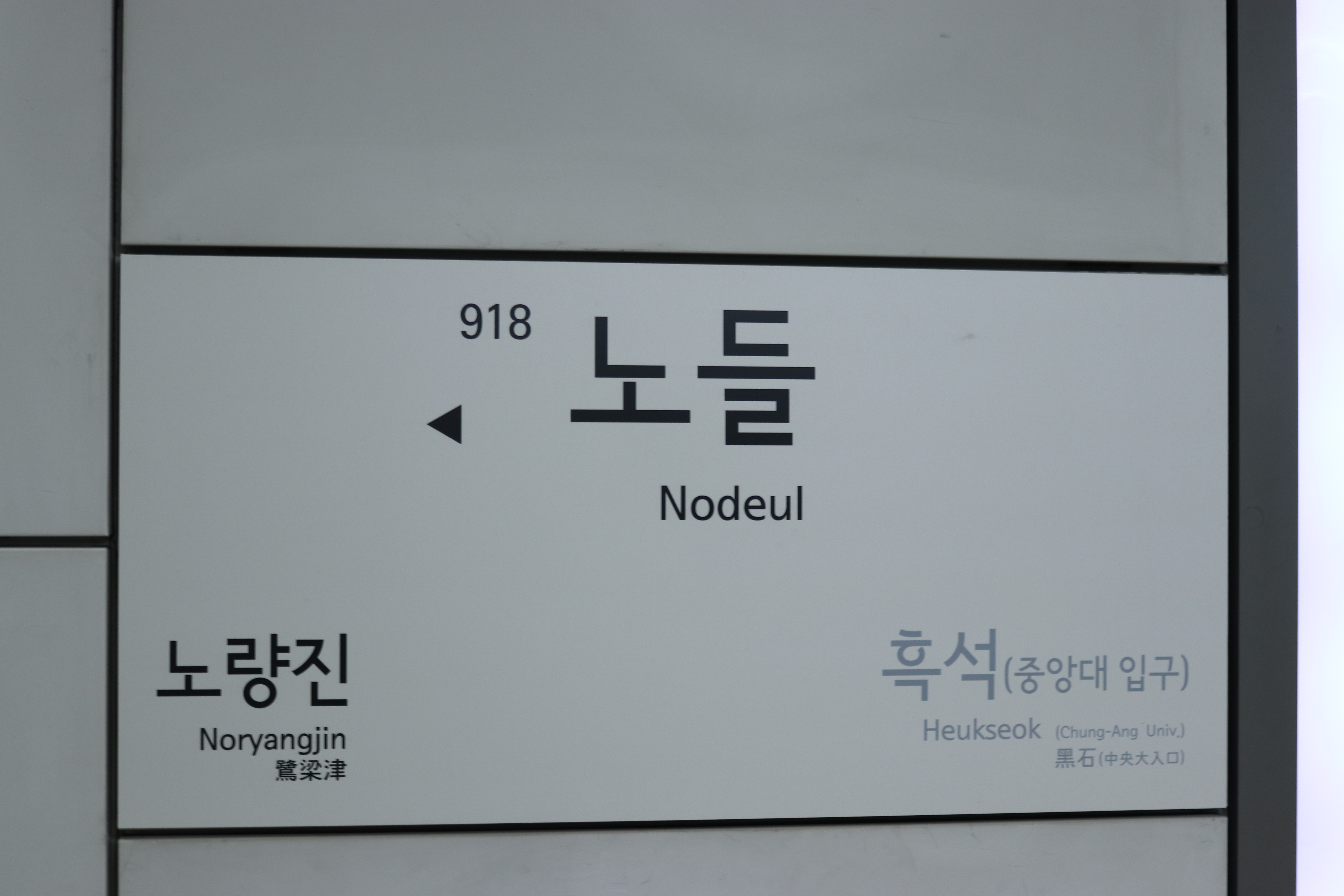 노들역 역명판